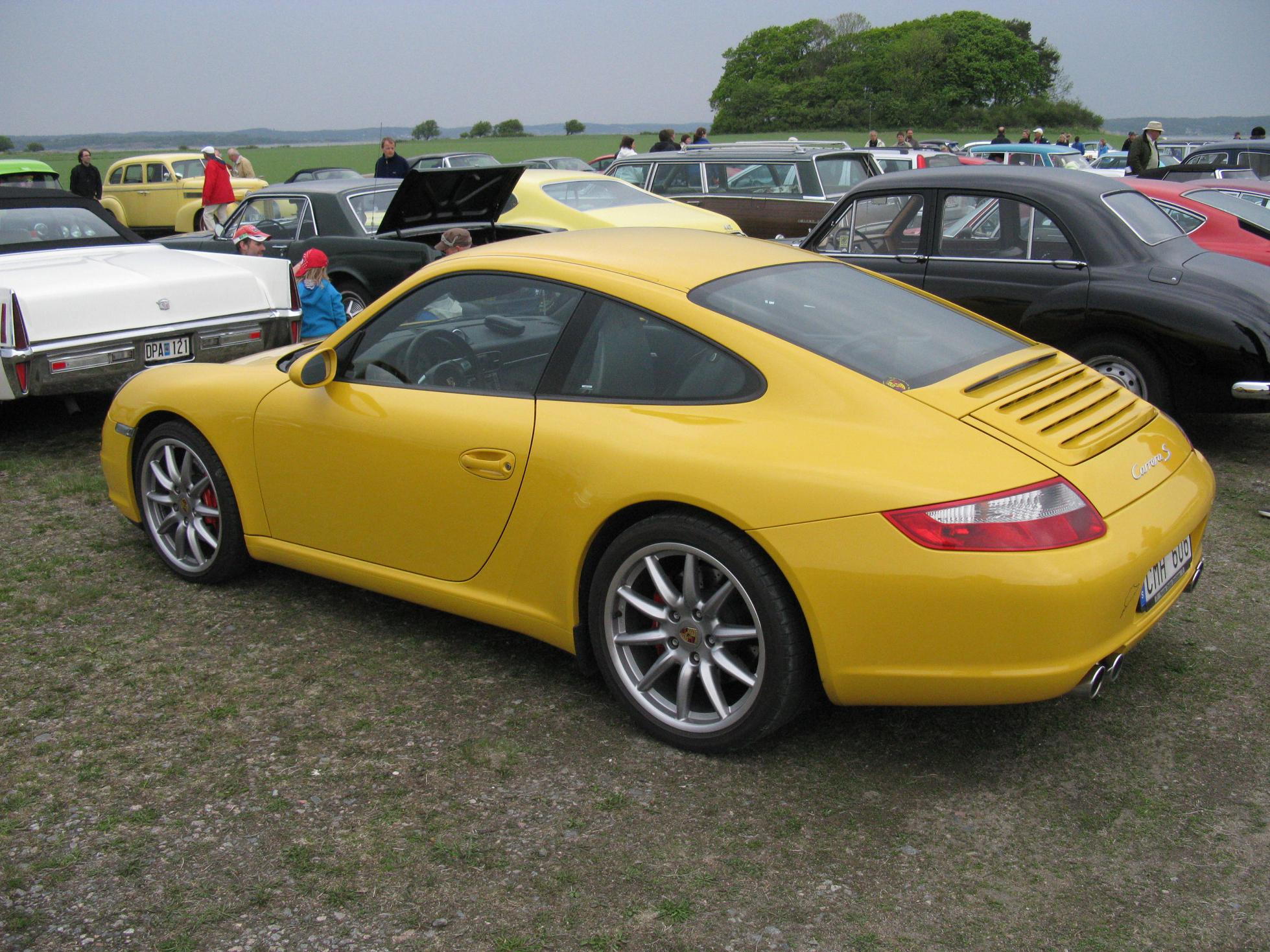 Porsche 911 Carrera S